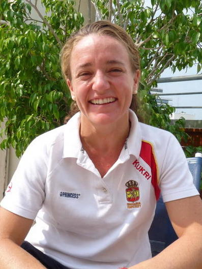 Montserrat Cruz